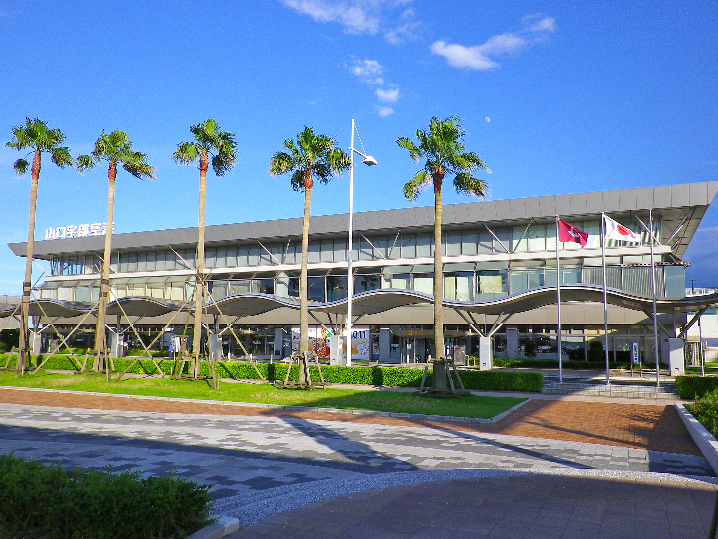 山口県宇部市。山口宇部空港国内線ターミナルビル。2011年7月11日撮影。